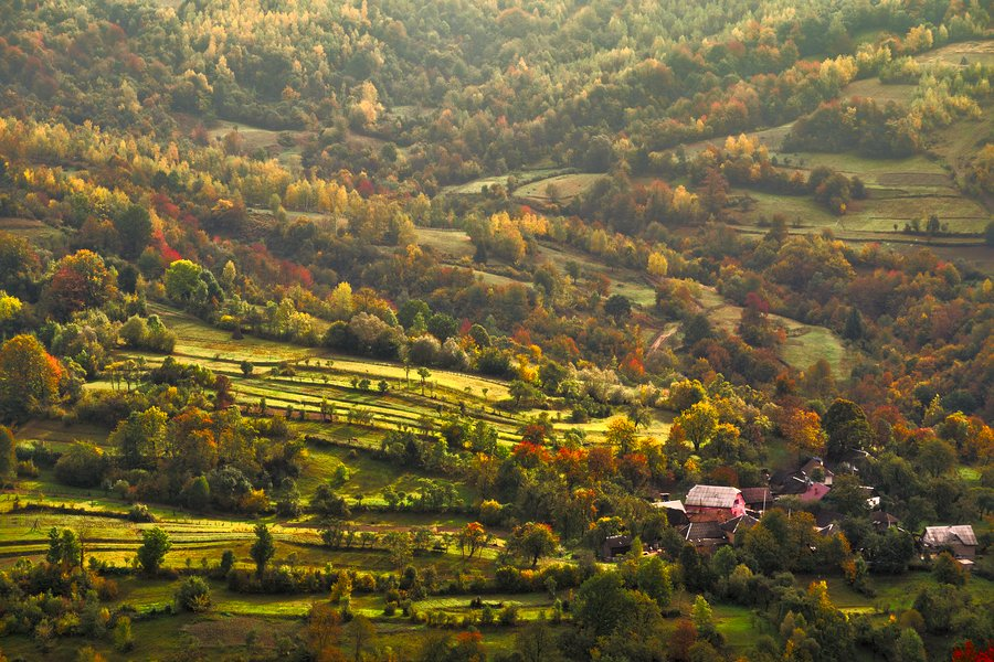 Ужанський НПП, Великоберезнянський р-н